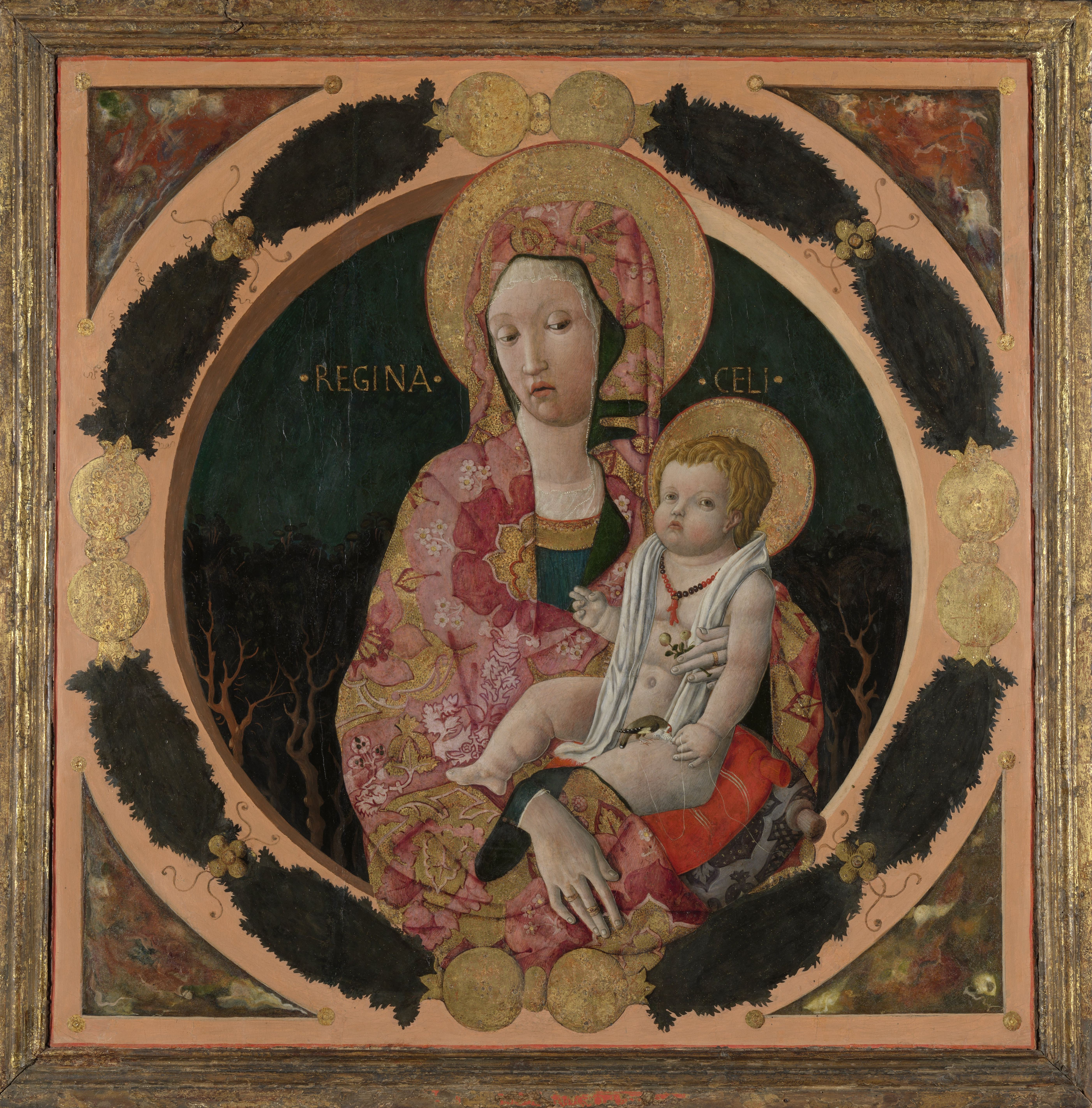 Halffiguur van Maria met het Christuskind zittend op een kussen op schoot. Maria heeft een takje met bloemen of vruchtjes in de hand, een vogeltje eet uit de hand van het kind. Op de achtergrond gestilleerde bomen. In een geschilderde ronde omlijsting met bladeren en vruchten.